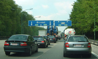 Photo de l'échangeur entre la A4 et le R0 Licensing Prise sur le wikipedia nl